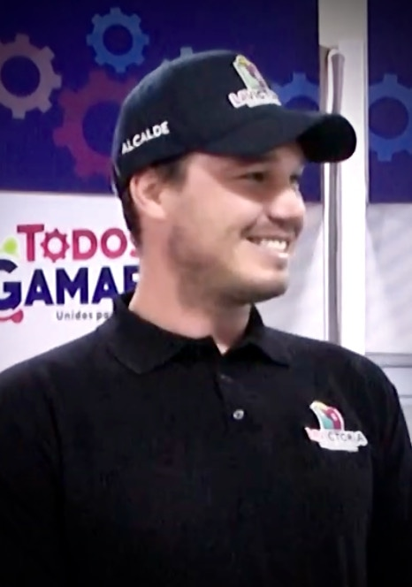 George Forsyth Sommer en 2019